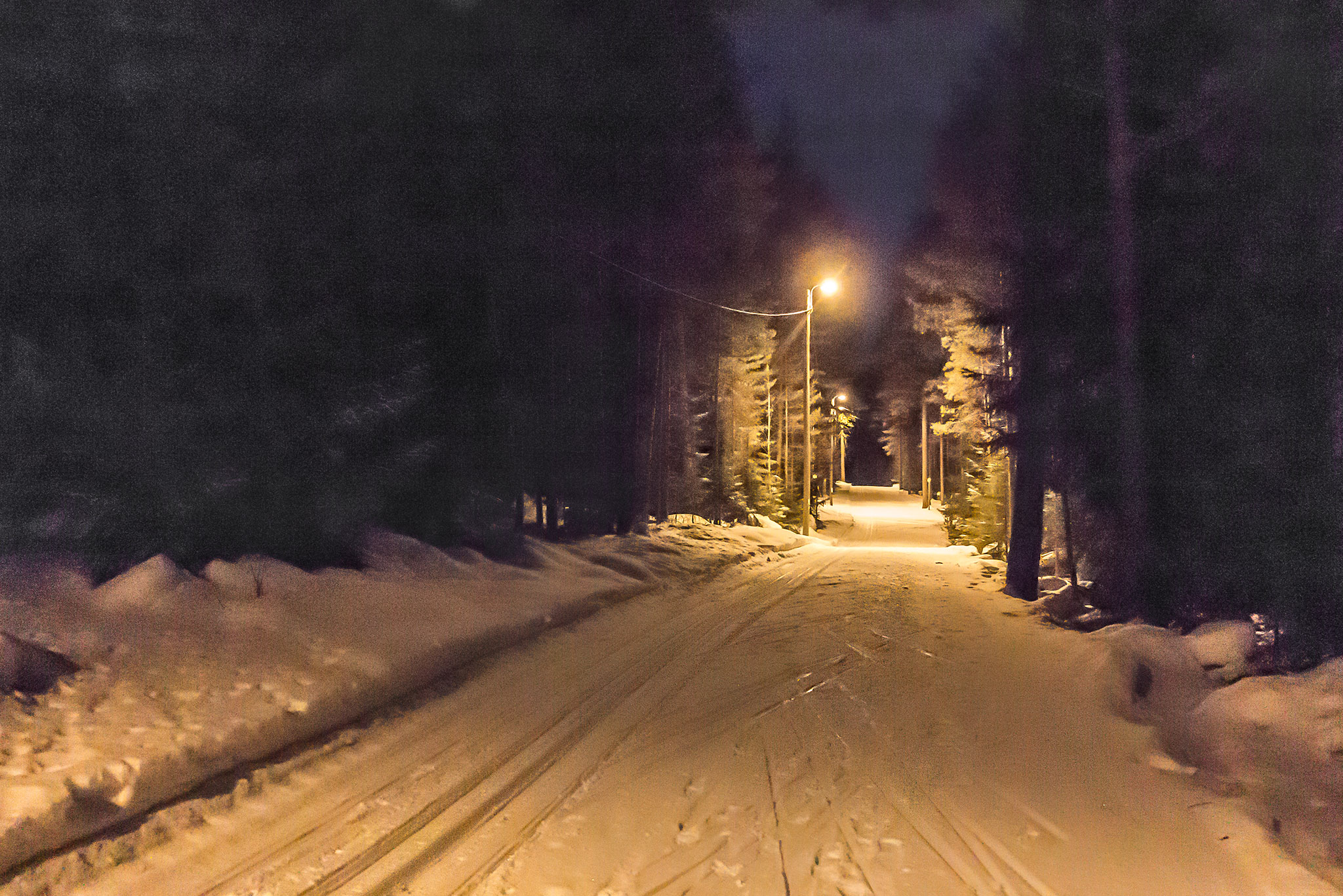 ski trail